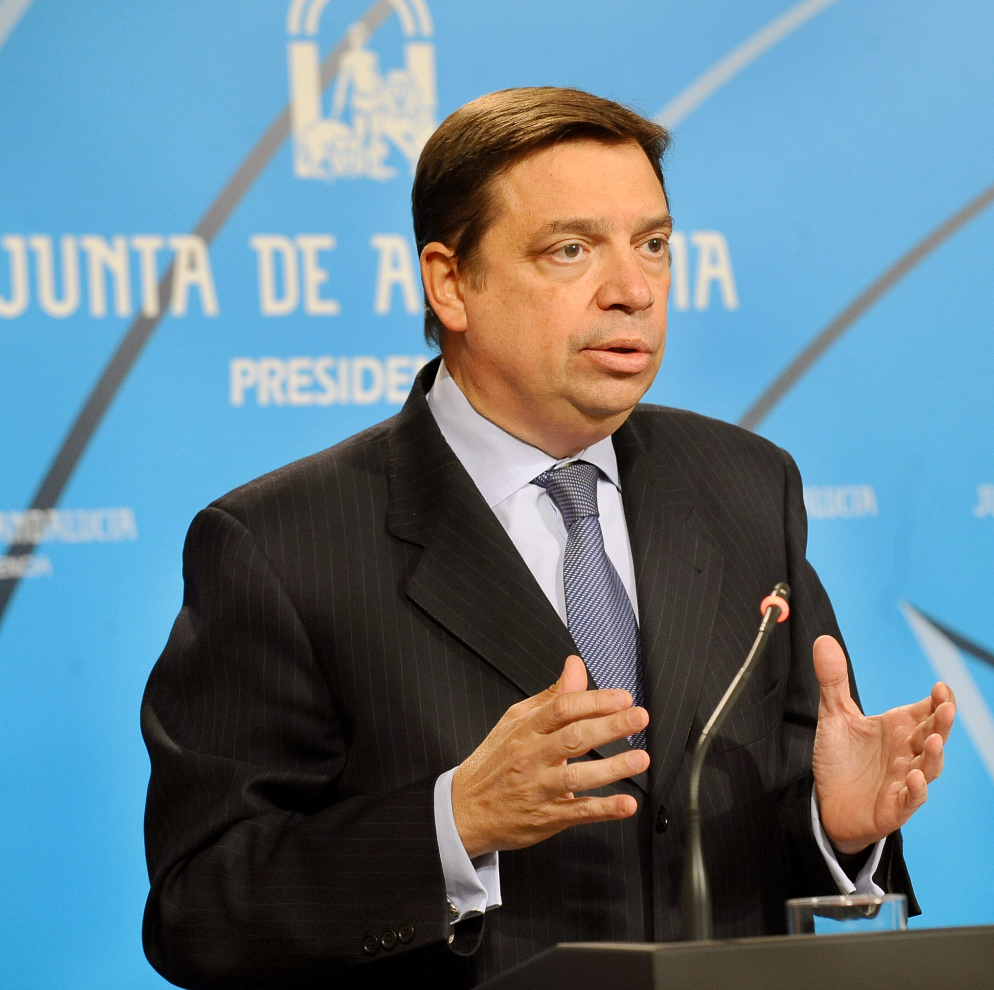 El consejero de Agricultura y Medio Ambiente de la Junta de Andalucía